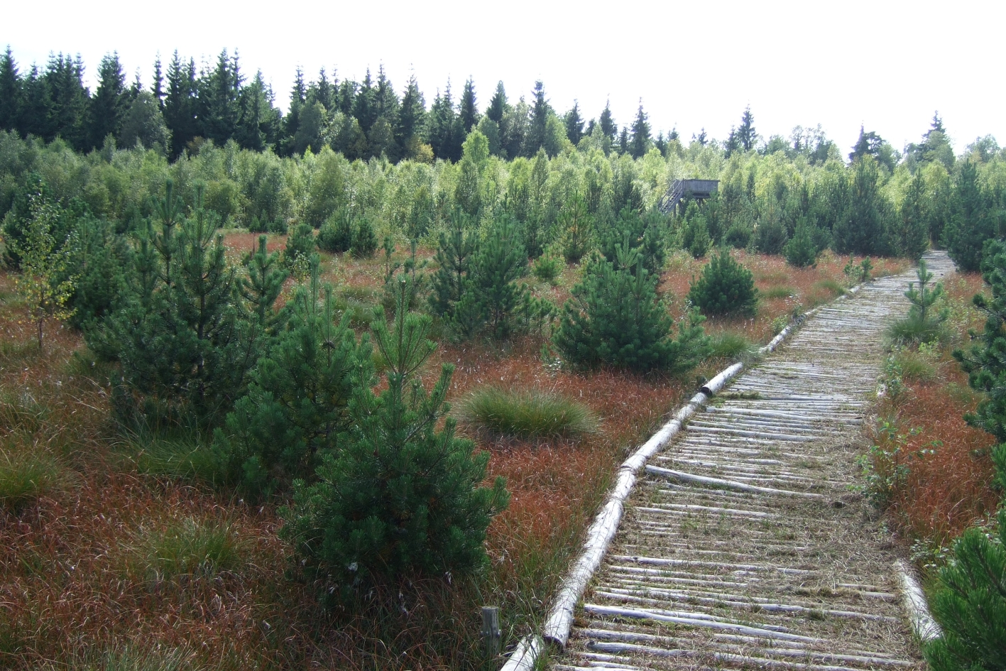 Die Stengelhaide ist ein bis in die 90-er Jahre abgetorftes Moor innerhalb des Naturschutzgebietes Mothhäuser Heide. Der Moorlehrpfad mit Aussichtsturm und Schautafeln läd zum Spaziergang ein.